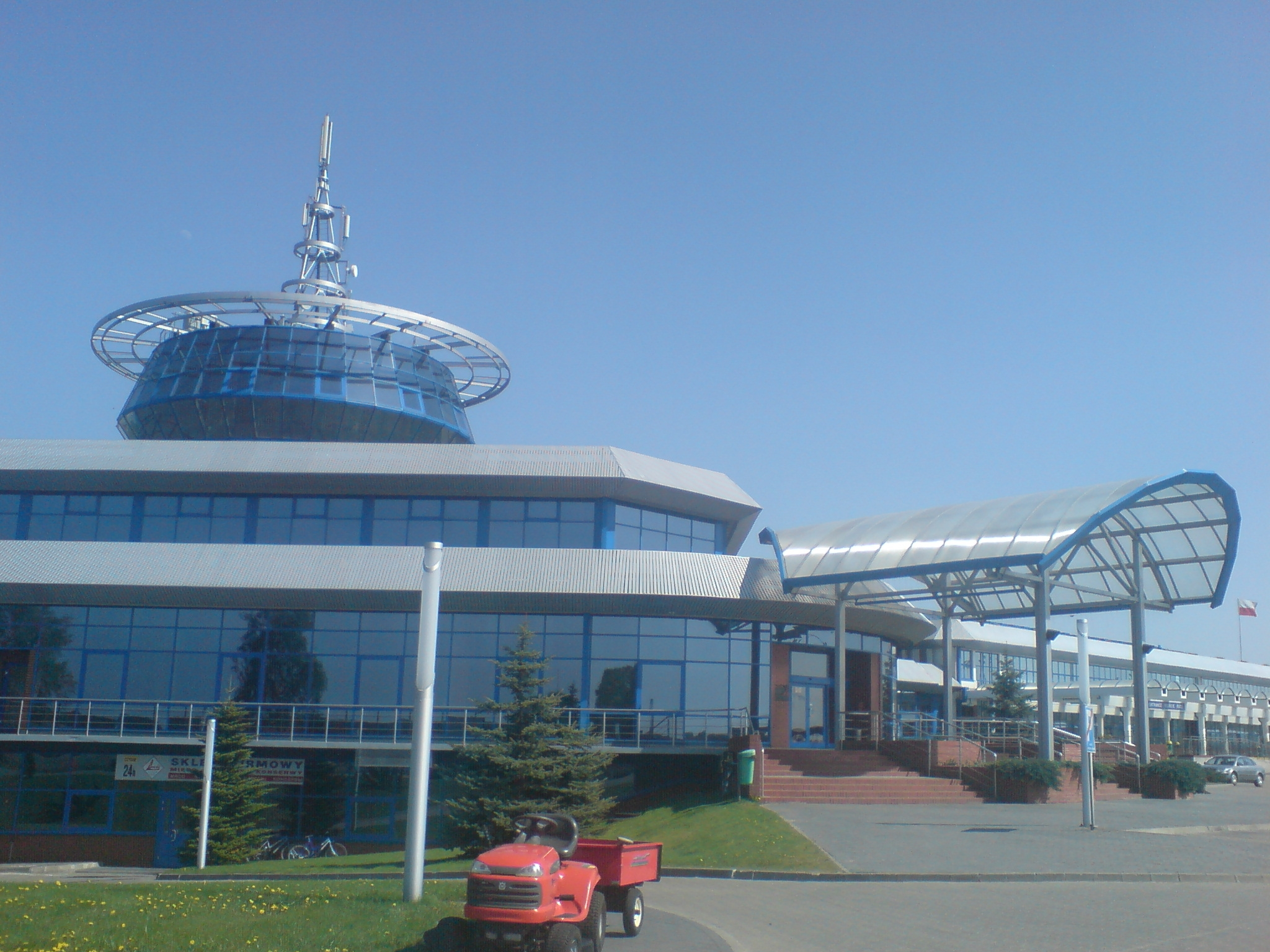 Terminal Koroszczyn (budynek główny)